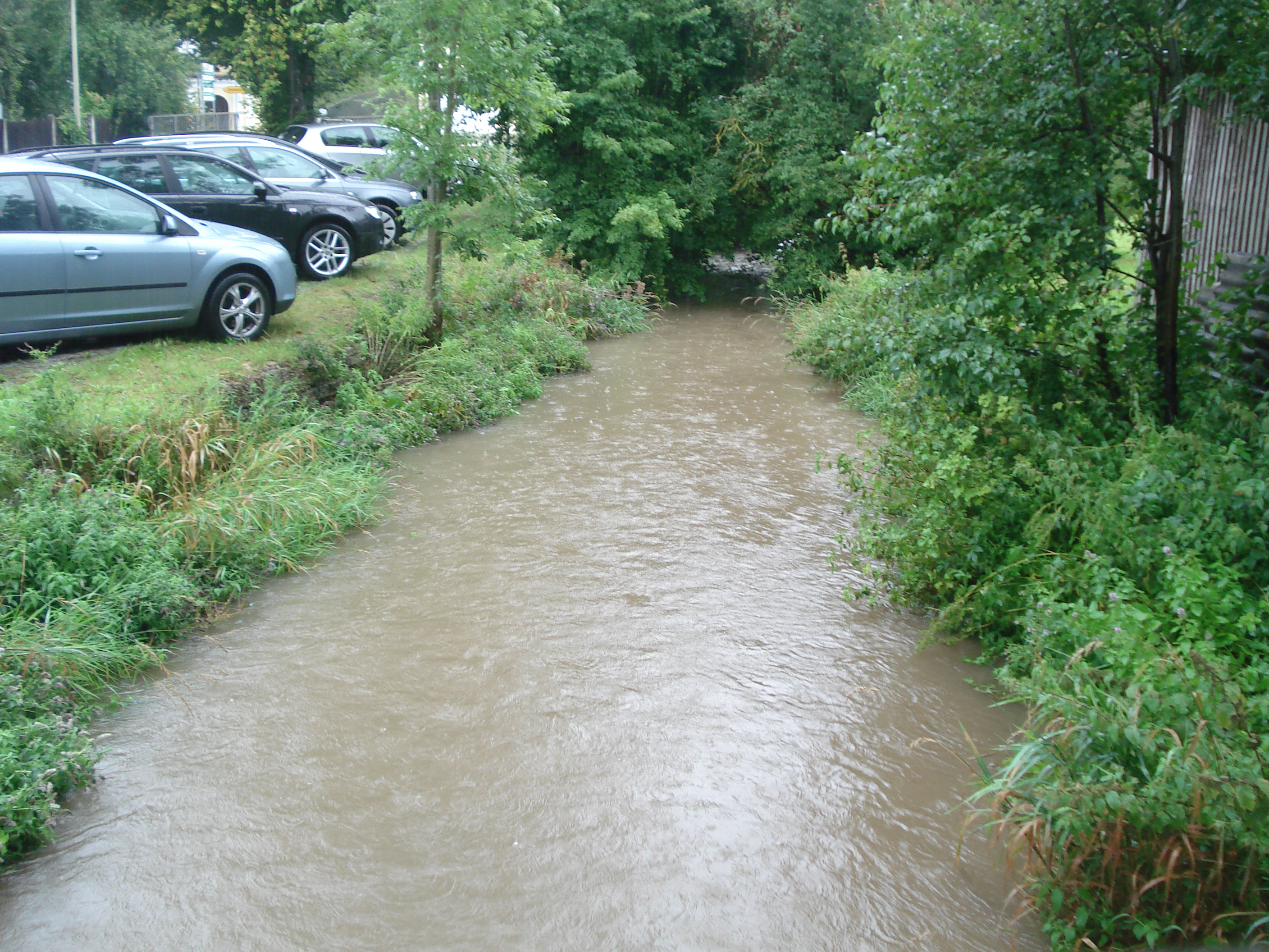 Die Wissinger Laber in Breitenbrunn